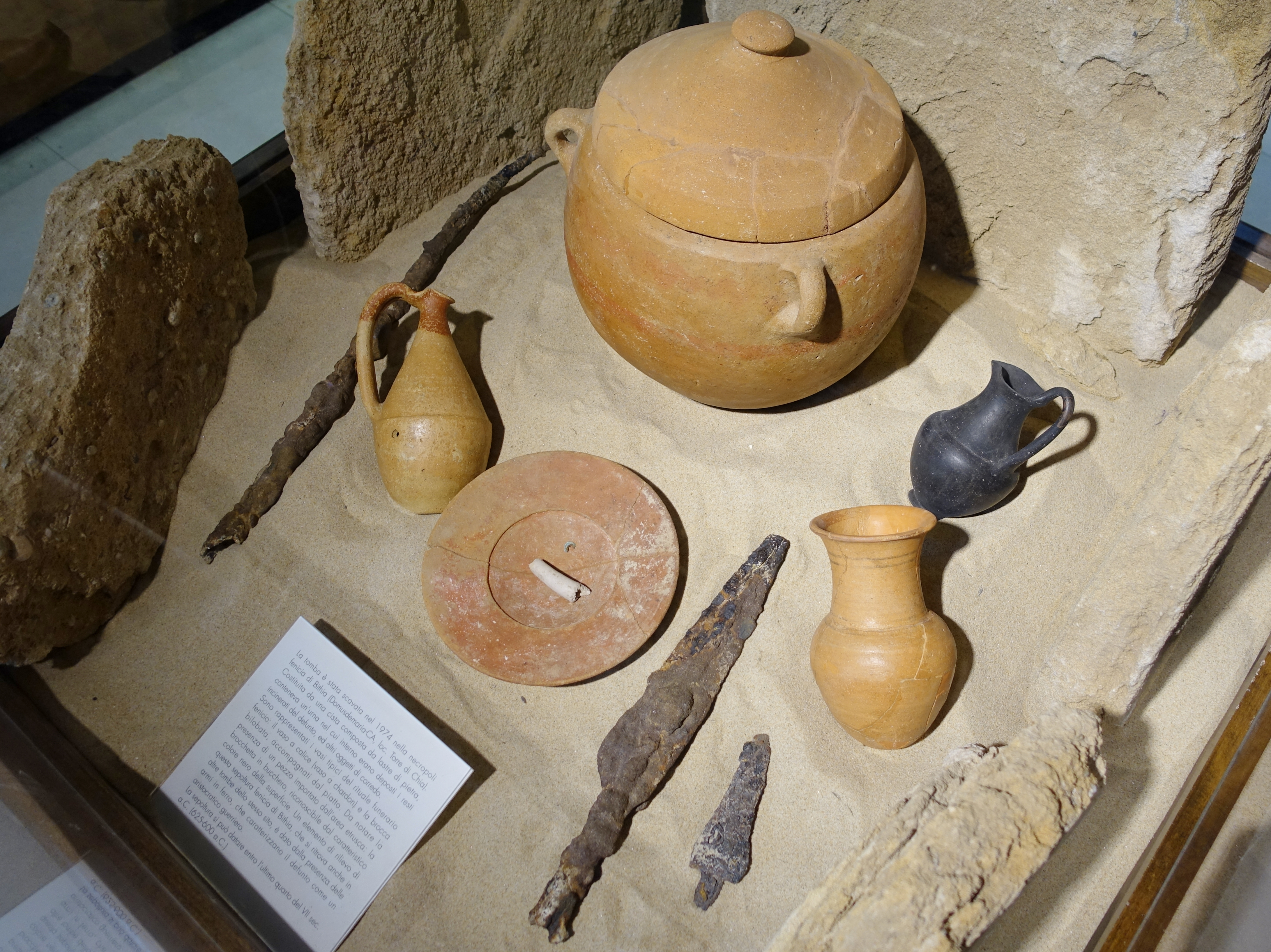 Fundstücke aus der phönizischen Nekropole von Bithia, Gemeinde Domus de Maria, Archäologisches Nationalmuseum Cagliari, Sardinien, Italien